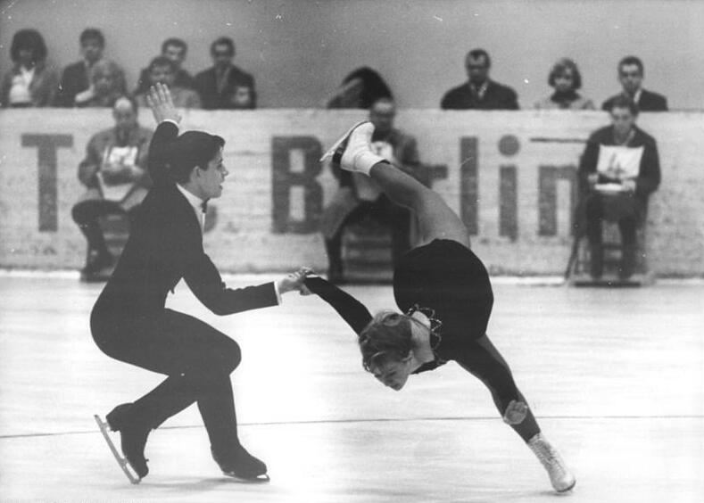 Elfi Kolodzey, Michael Pürst Zentralbild Koard 8.11.1965 Berlin: Überprüfungslaufen im Eiskunstlauf. Das Niveau im Paarlaufen ist am stärksten angestiegen. Das bewiesen auch Elfi Kolodzey - Michael Pürst (SC Dynamo Berlin) bei ihrer Kür am 7.11.1965 in der Berliner Werner-Seelenbinder-Halle. Beim ersten Überprüfungslaufen der Saison im Eiskunstlauf belegten sie den fünften Platz.